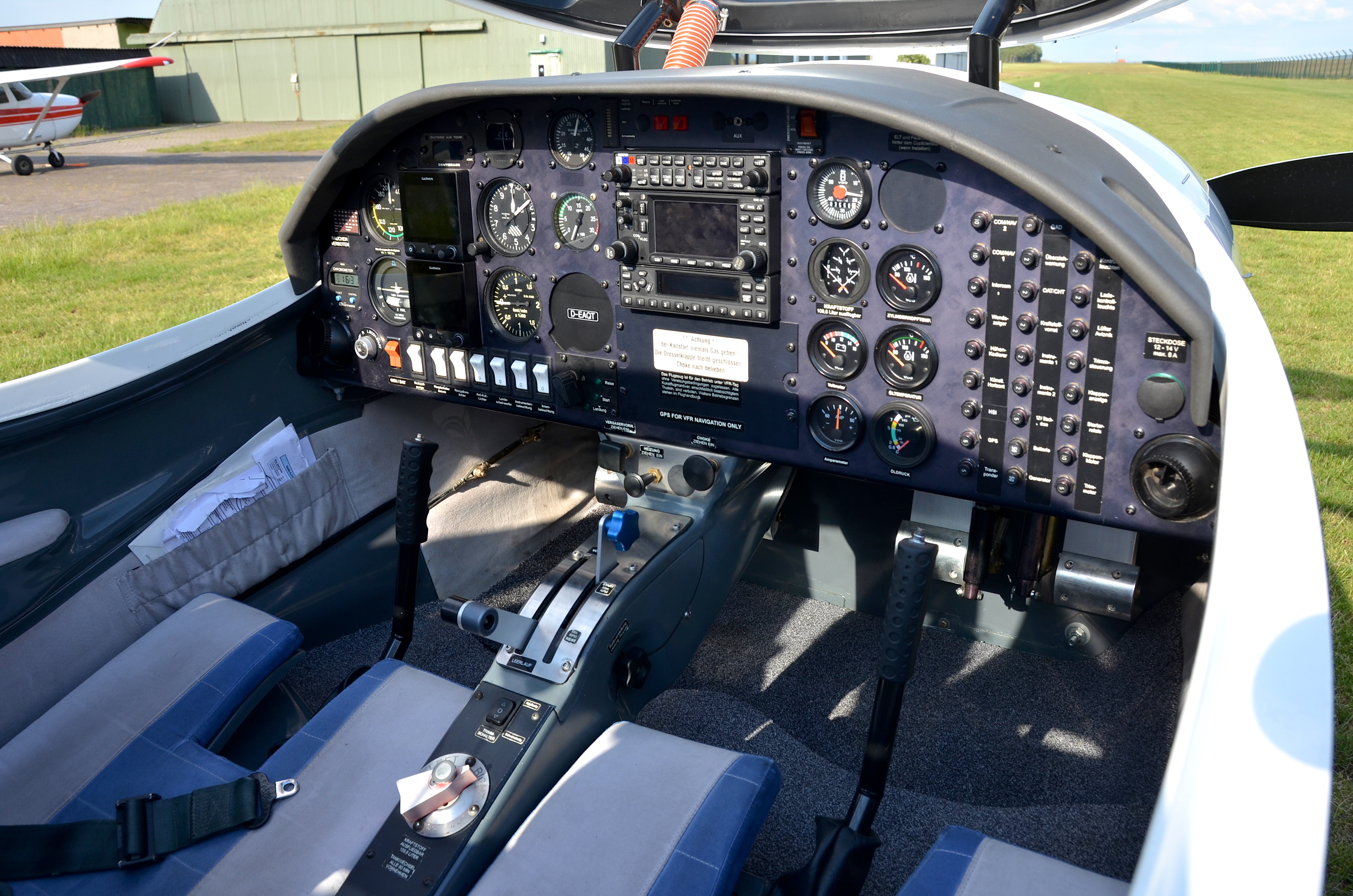 Cockpit der Aquila AT01 (A210)